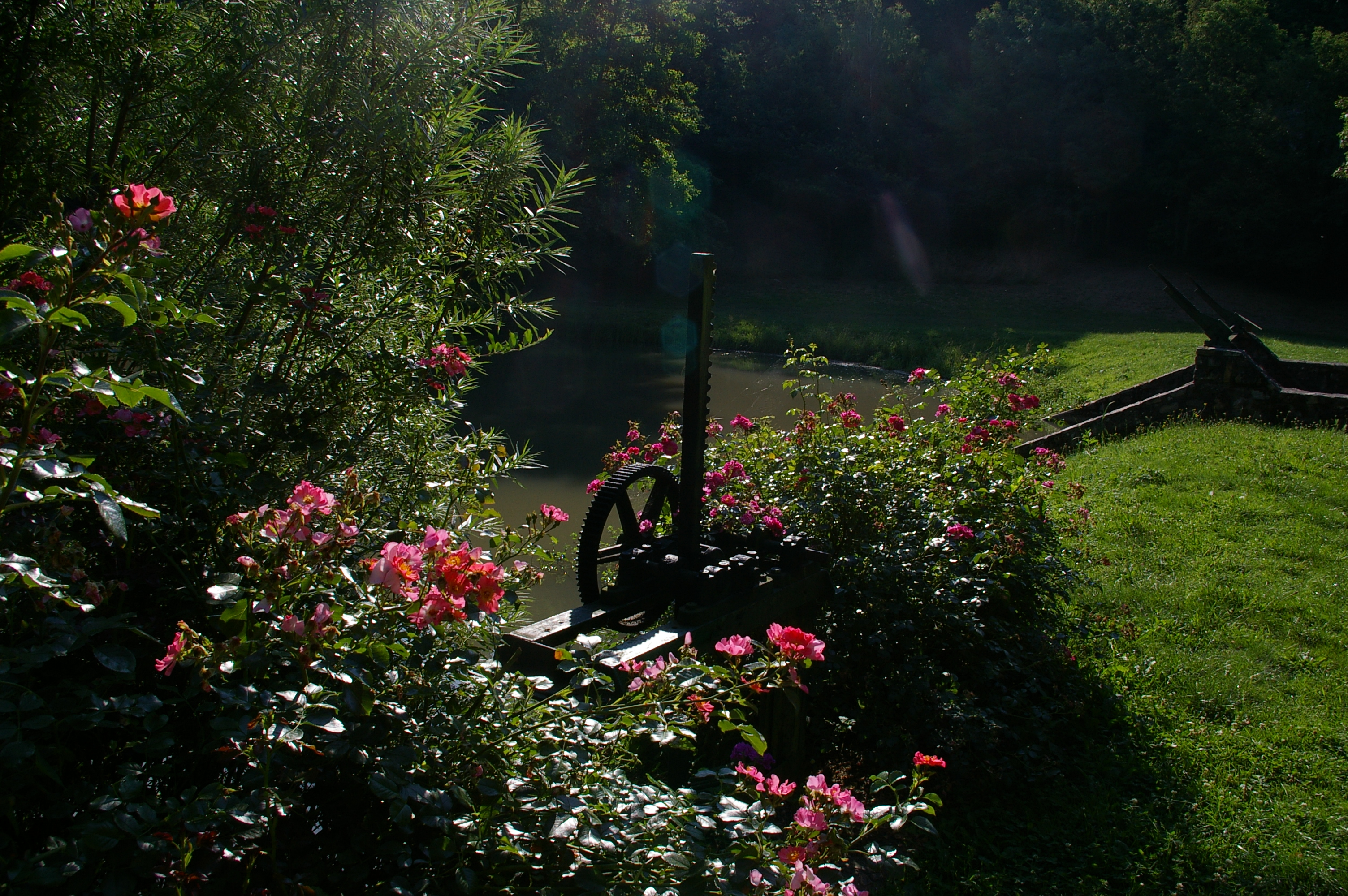 Plan d'eau du Pont-neuf sur l'Erve à Sainte-Suzanne (Mayenne)